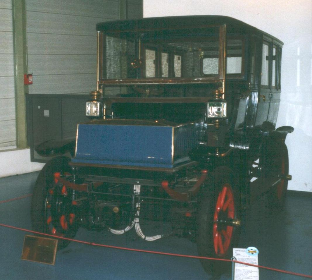 Krieger 1908